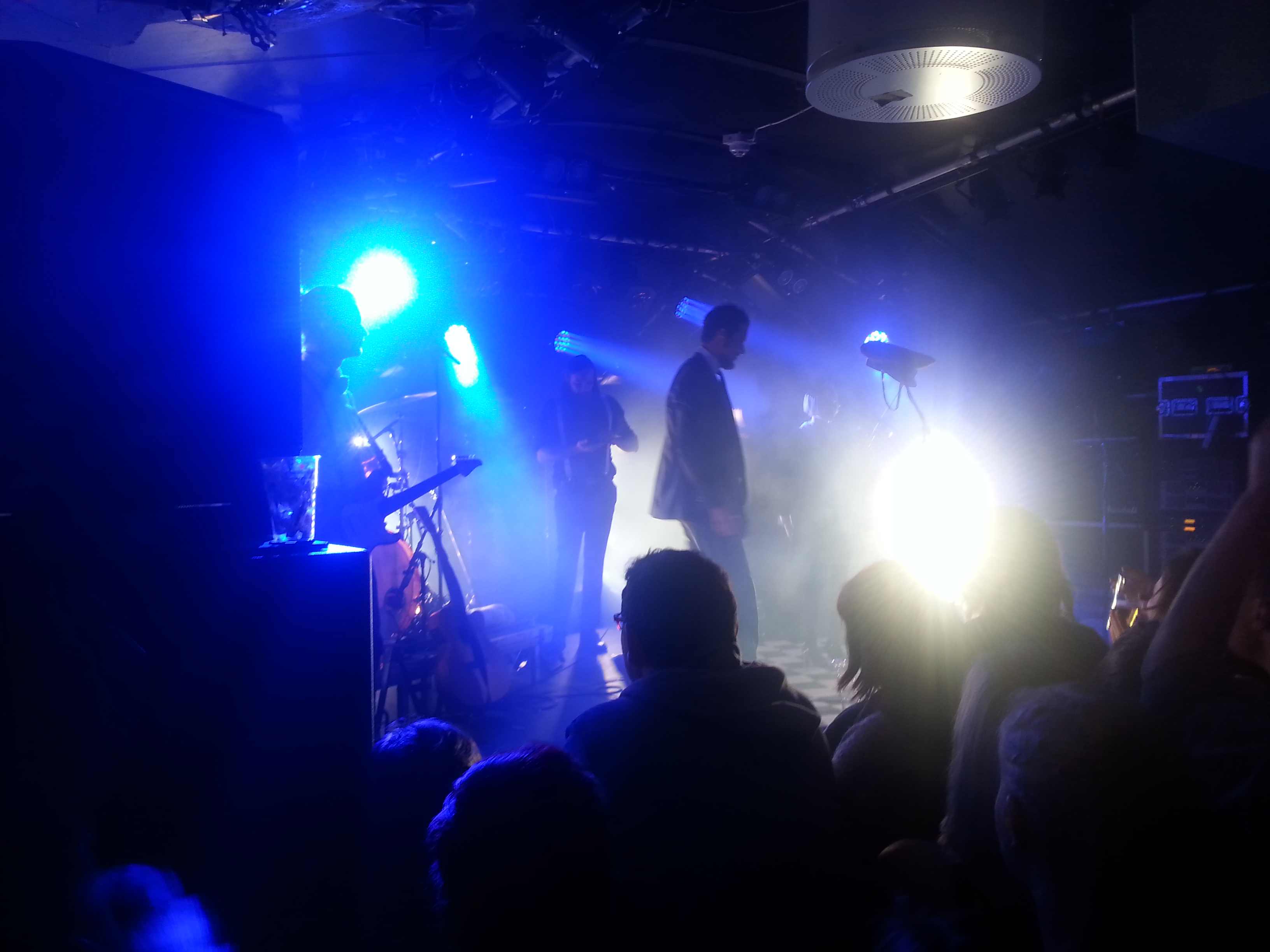 Major Parkinson live på Hulen i Bergen (2016)